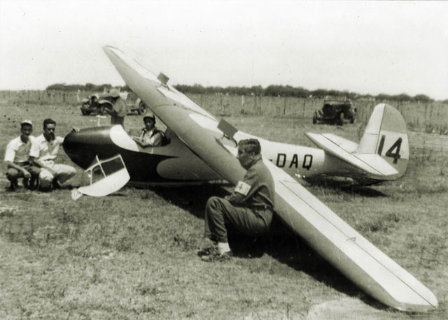 Avión de la Fábrica Militar de Aviones de Córdoba